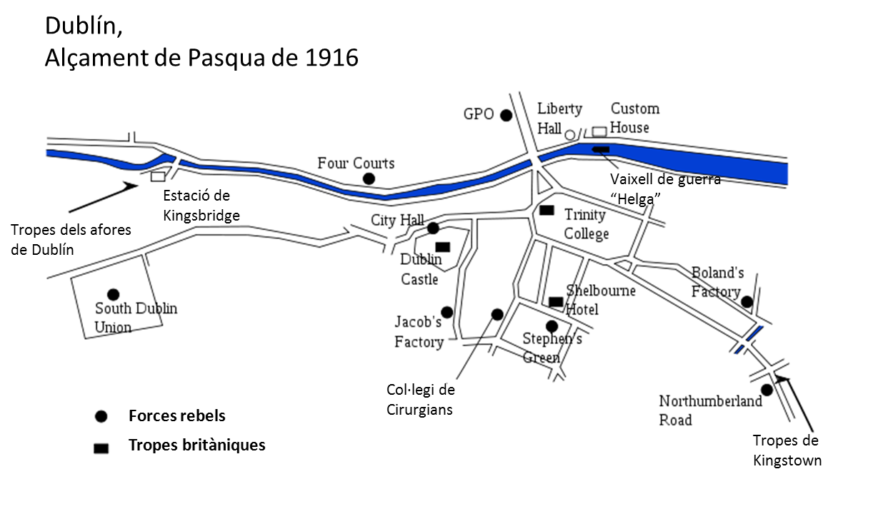 Esquema de les posicions rebels i britàniques en el transcurs de l'Alçament de Pasqua de 1916